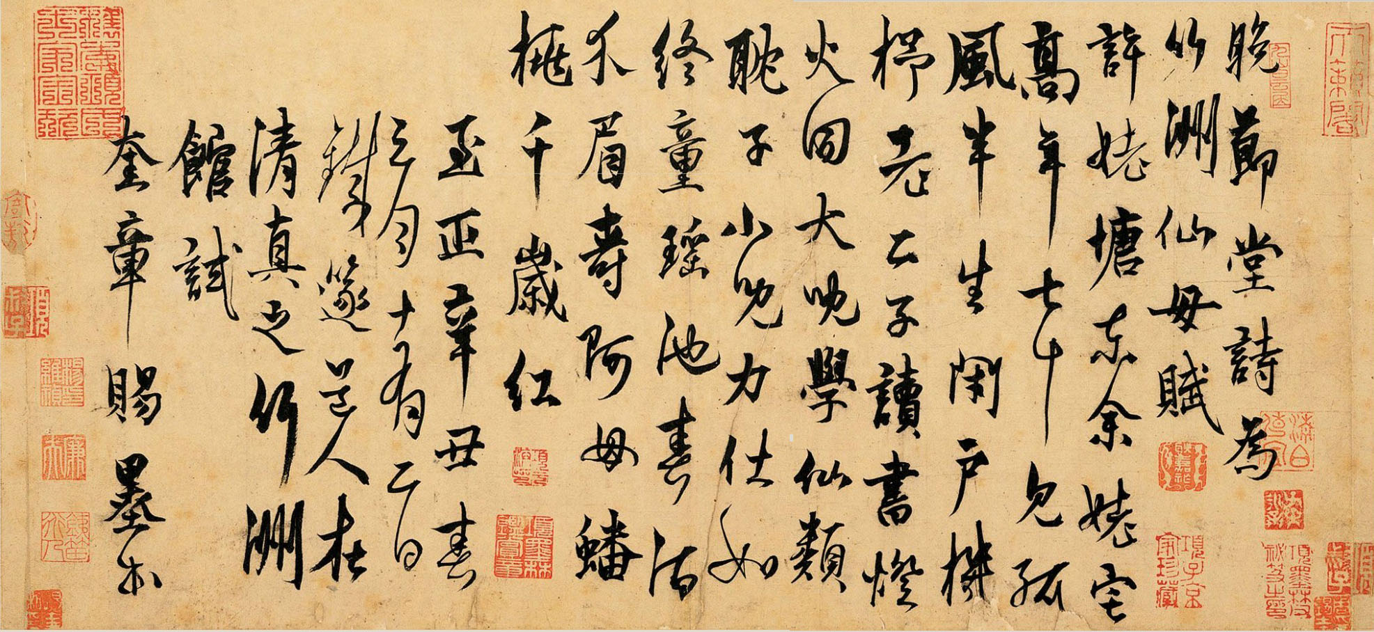 本幅為六十六岁时书，时杨氏已定居松江数载，常於斋中与友人门生瀹茗品酒，试新笔佳墨，赏题字画。此诗即用奎章赐墨所书，下笔力透纸背，老辣之甚。本幅為元人法书册第三幅。 释文：晚节堂诗為竹洲仙母赋。许姥塘东余姥宅。高年七十见孤风。半生闭户机杼老。公子读书灯火同。大儿学仙类耽子。小儿力仕如终童。瑶池春酒介眉寿。阿母蟠桃千岁红。至正辛丑春三月十有二日。铁篴道人在清真之竹洲馆试奎章赐墨书。